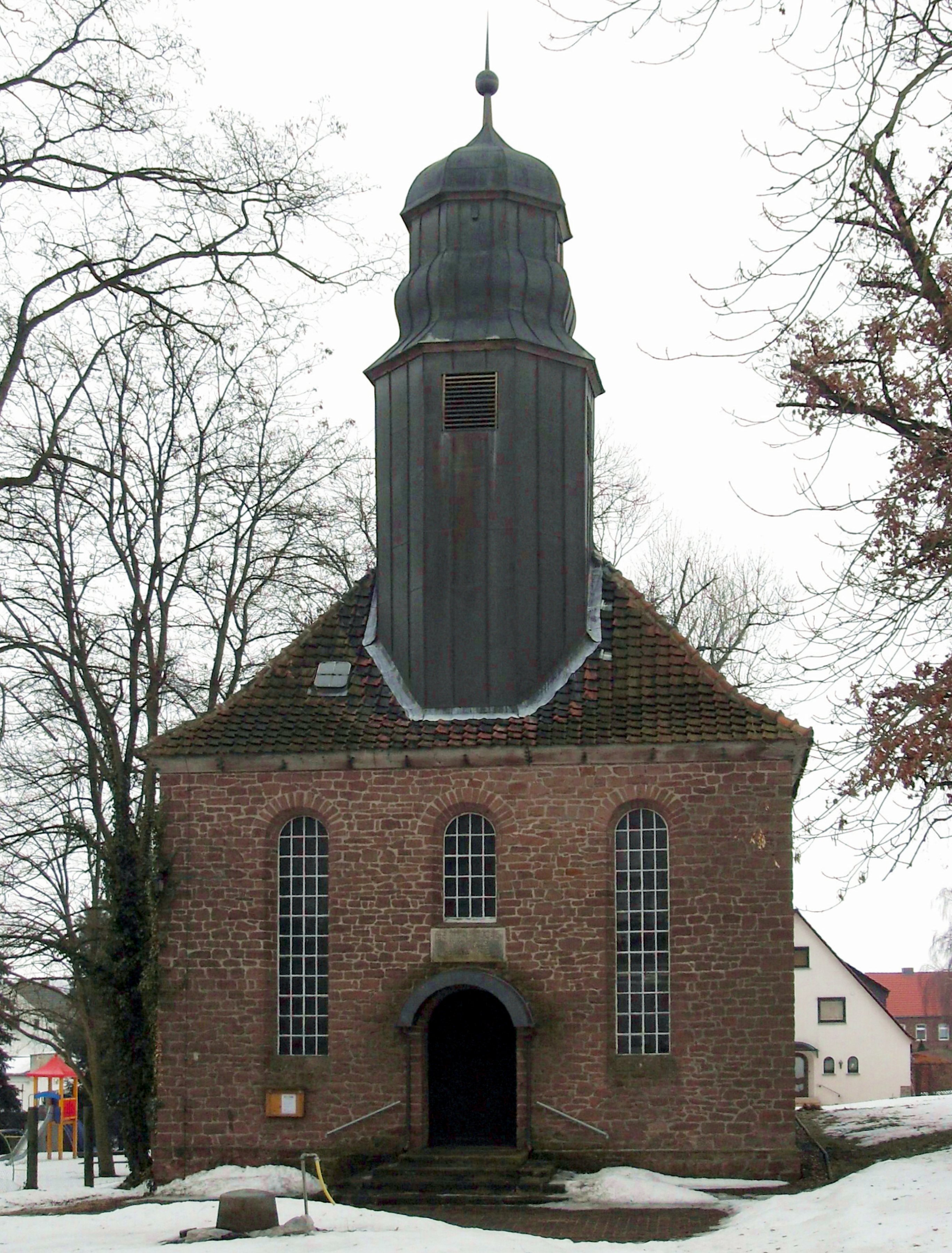 Kirche in Ovelgünne, Gemeinde Eilsleben, Landkreis Börde, Deutschland